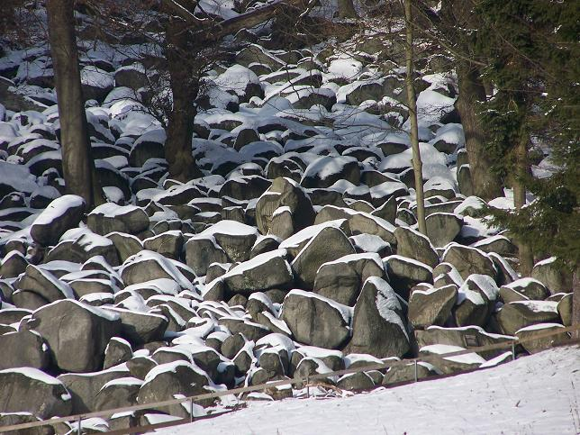 Winterimpression am unteren Felsenmeer mit Siegfriedquelle (links im Bild), Lautertal, Oderwald